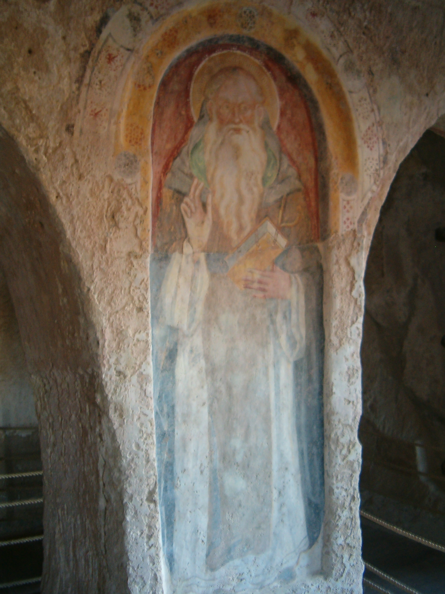 Sassi di Matera (Italy)